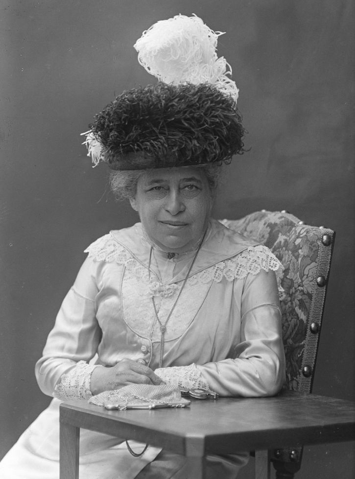 Charlotte Jacobs ca. 1913 vastgelegd door Jacob Merkelbach.